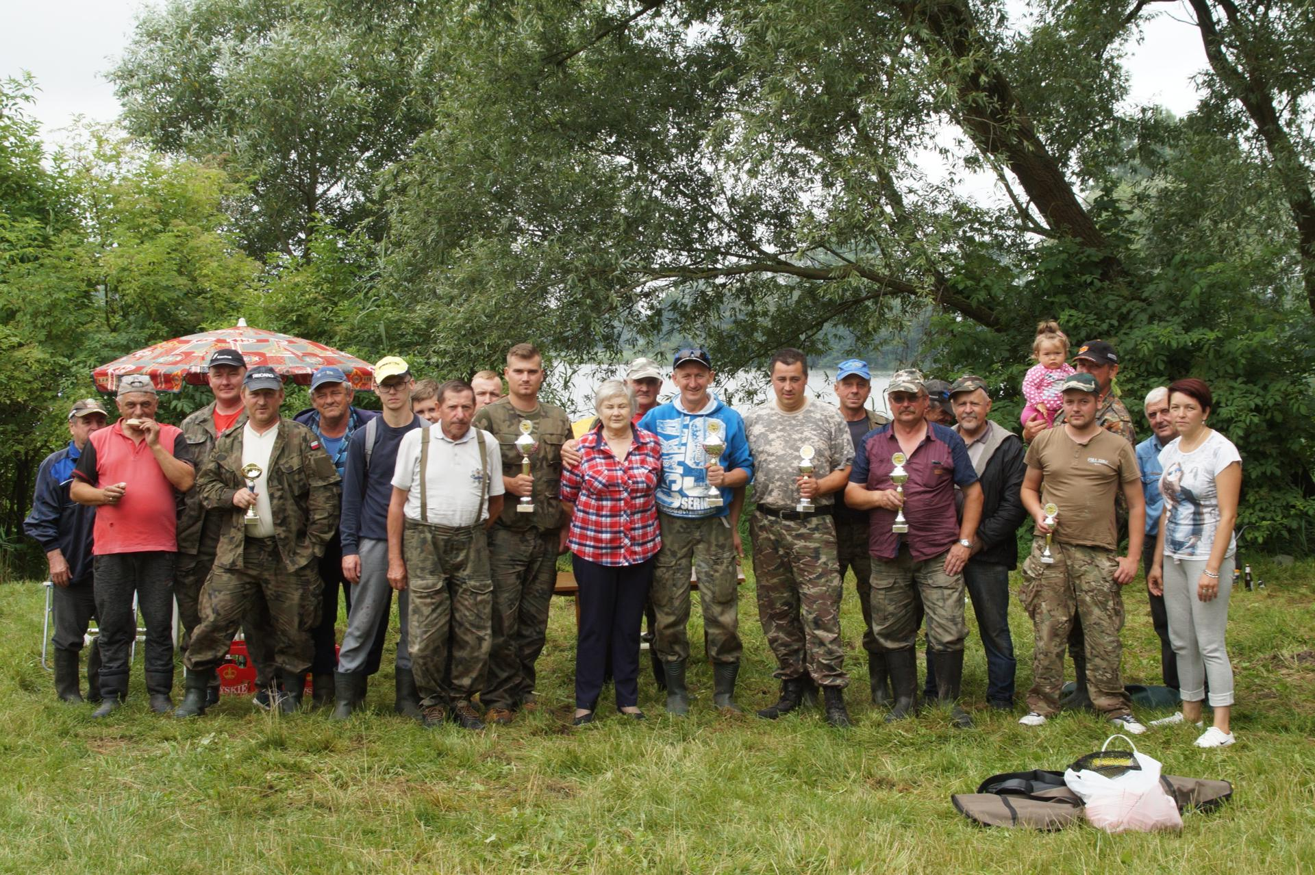 Zawody wędkarskie o puchar prezesa Wojcieszyc